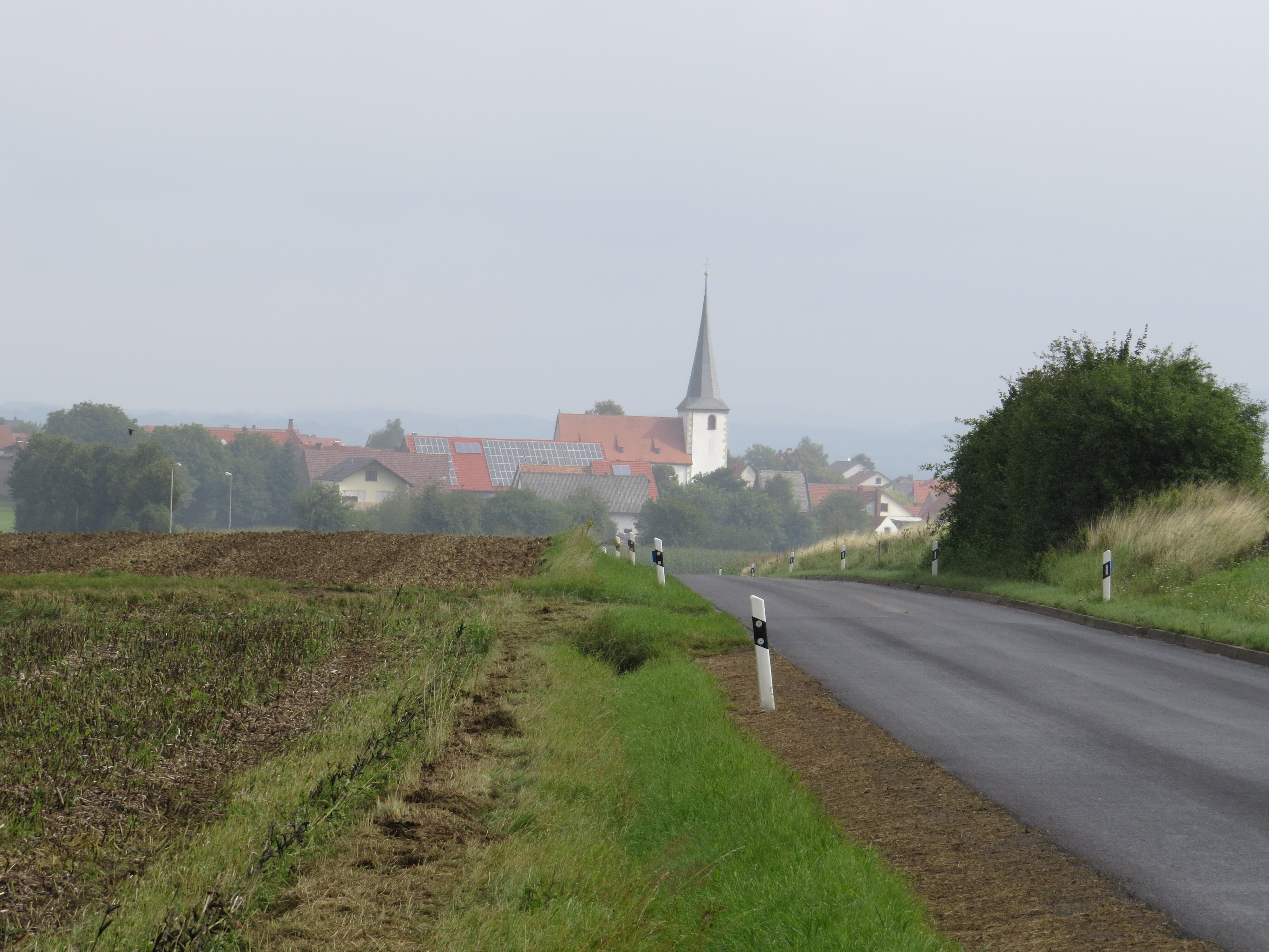 Ebertshausen von Süden, Üchtelhausen